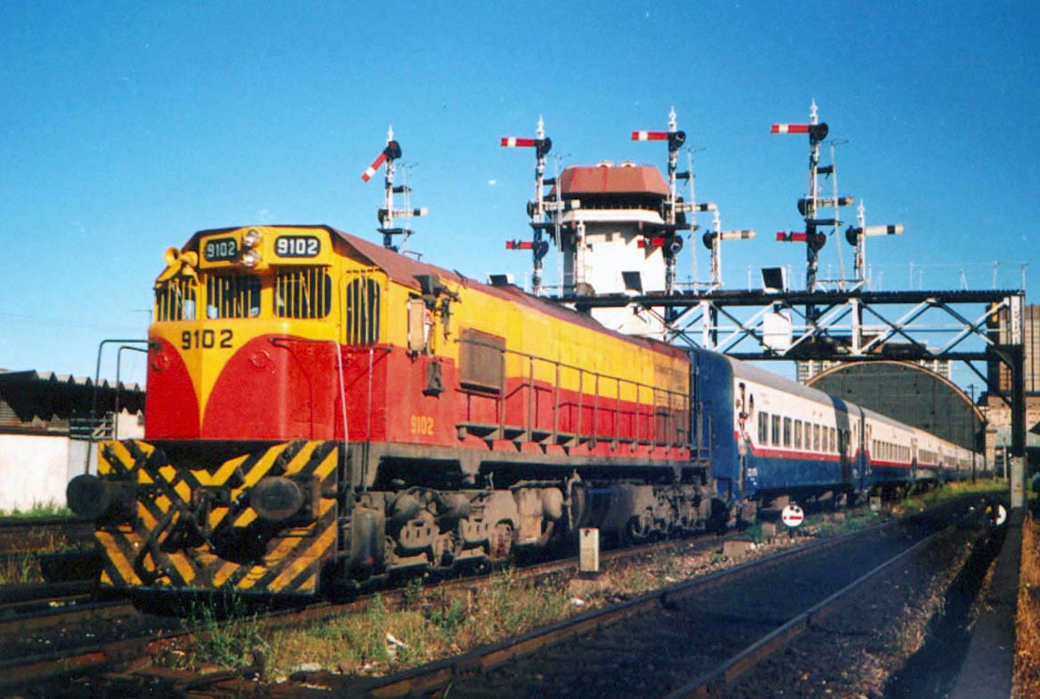 Tren Estrella del Norte de Ferrocarriles Argentinos con destino Tucumán partiendo de Retiro. Locomotora General Motors GT22CW. Año 1990.9012 Retiro